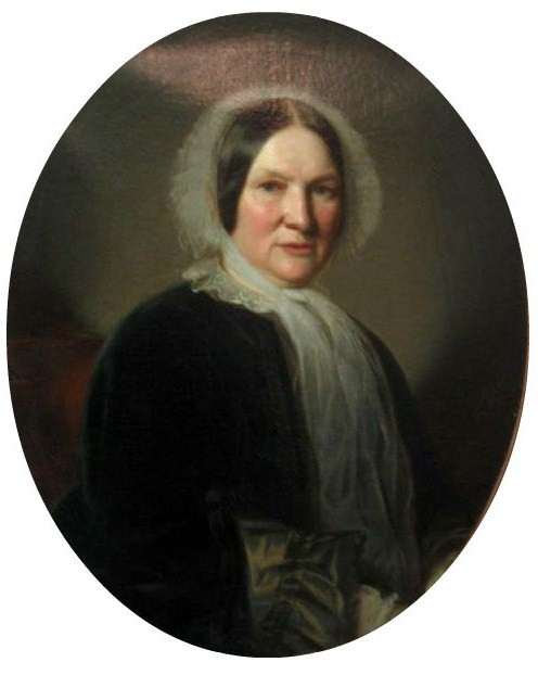 Мария Васильевна Олсуфьева (1791—1863), ур. Нарышкина, в первом браке де Бальмен, во втором браке за А. Д. Олсуфьевым.